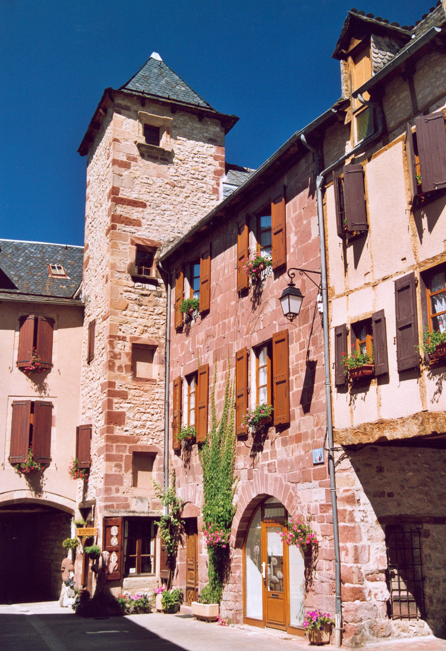 France Lozère La Canourgue Photographie prise par GIRAUD Patrick Août 2005